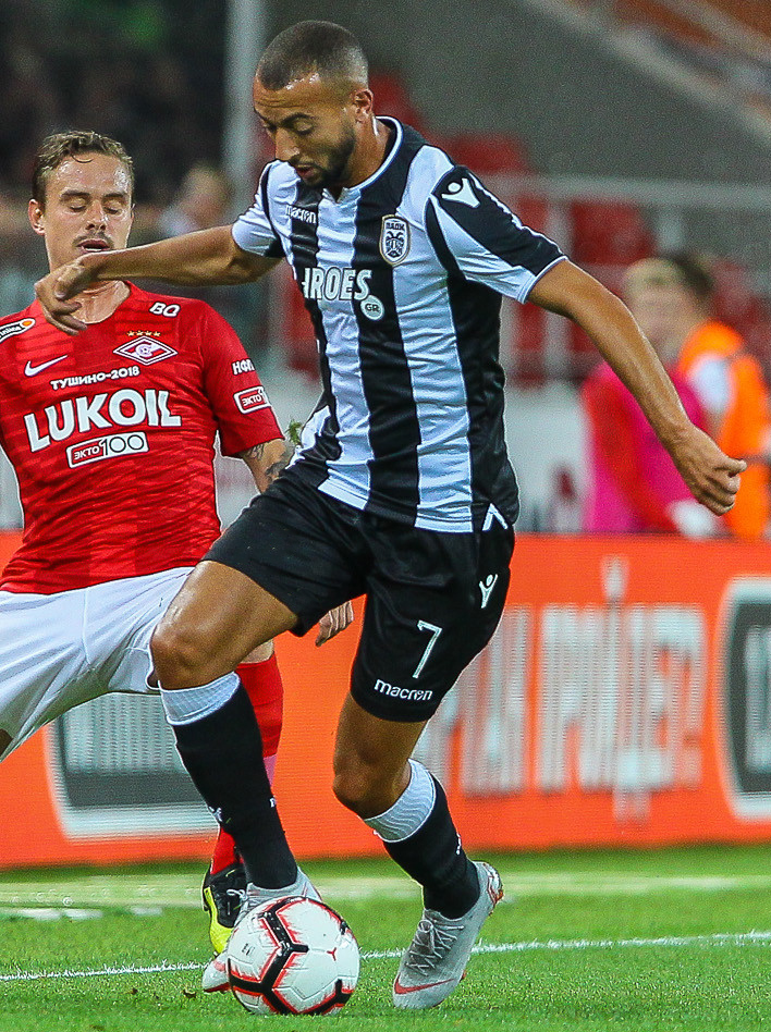 «Спартак» вылетел из Лиги чемпионов